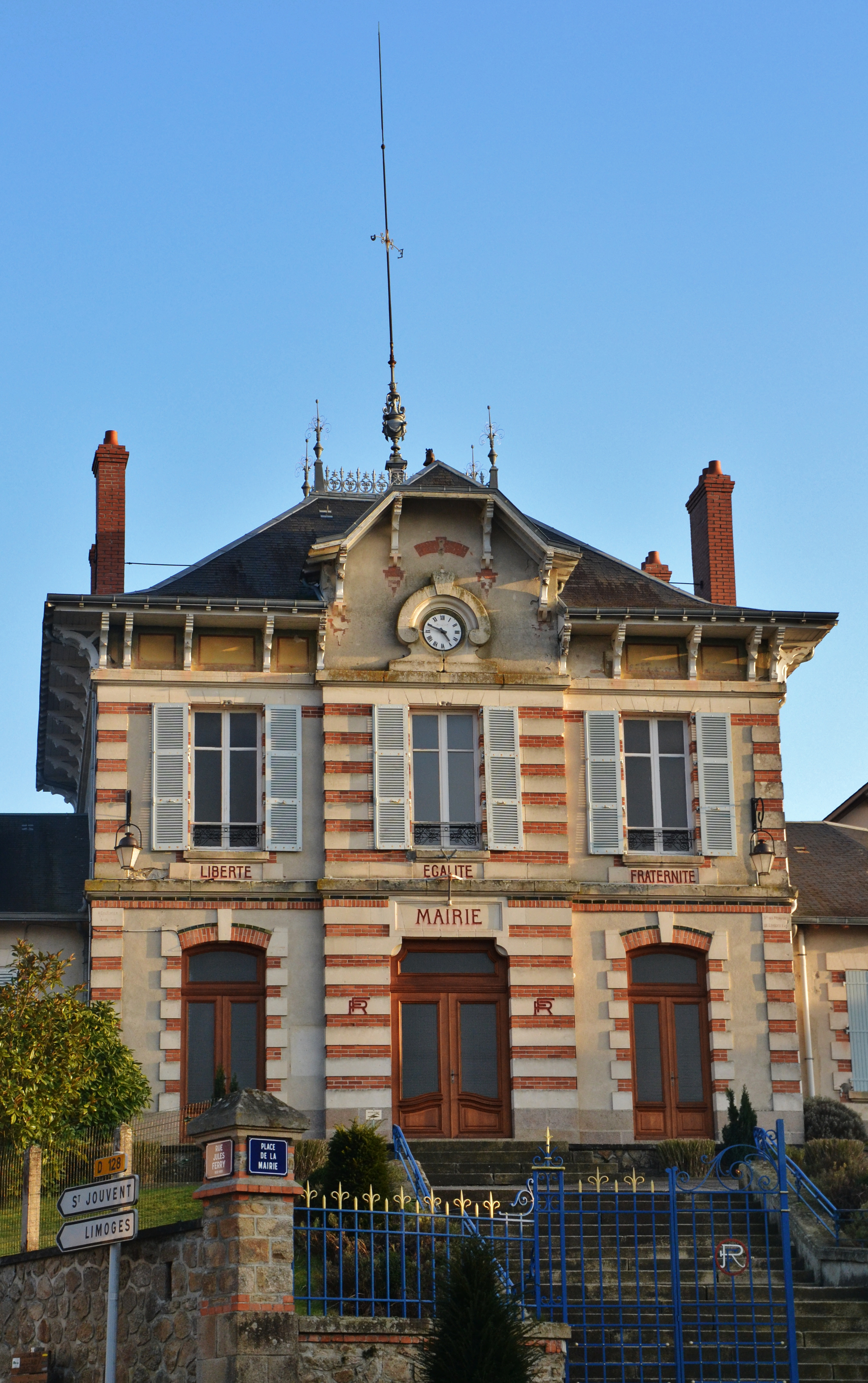 La façade de la mairie de Peyrilhac (Haute-Vienne, France)